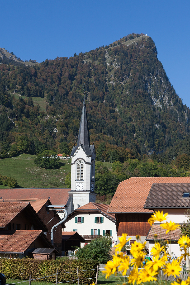 Albeuve mit Kirche und dem Vanil de l'Arche im Hintergrund